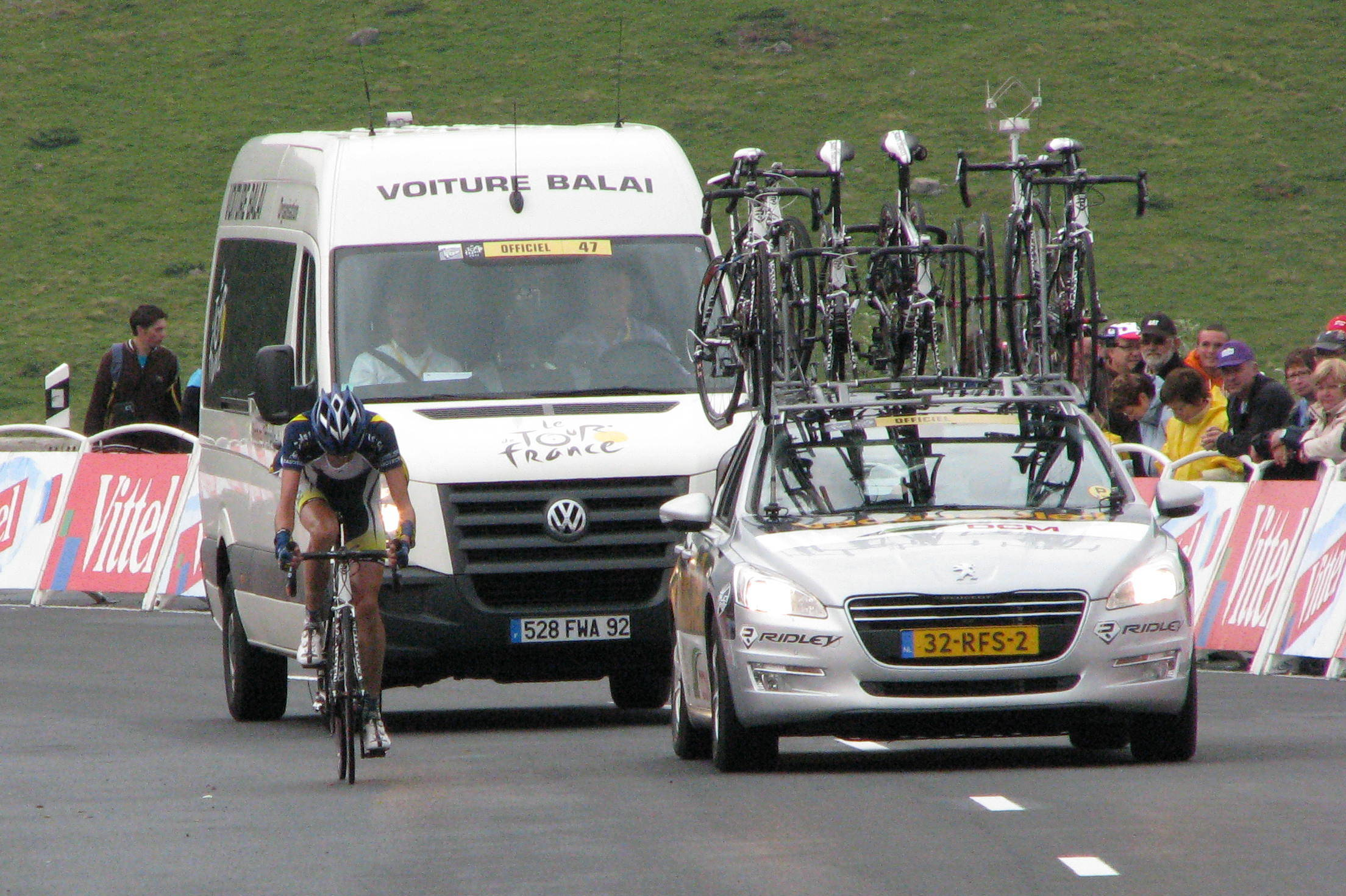 Wouter Poels devant la voiture-balai lors de la 8e étape du Tour de France 2011 (Aigurande - Super-Besse)